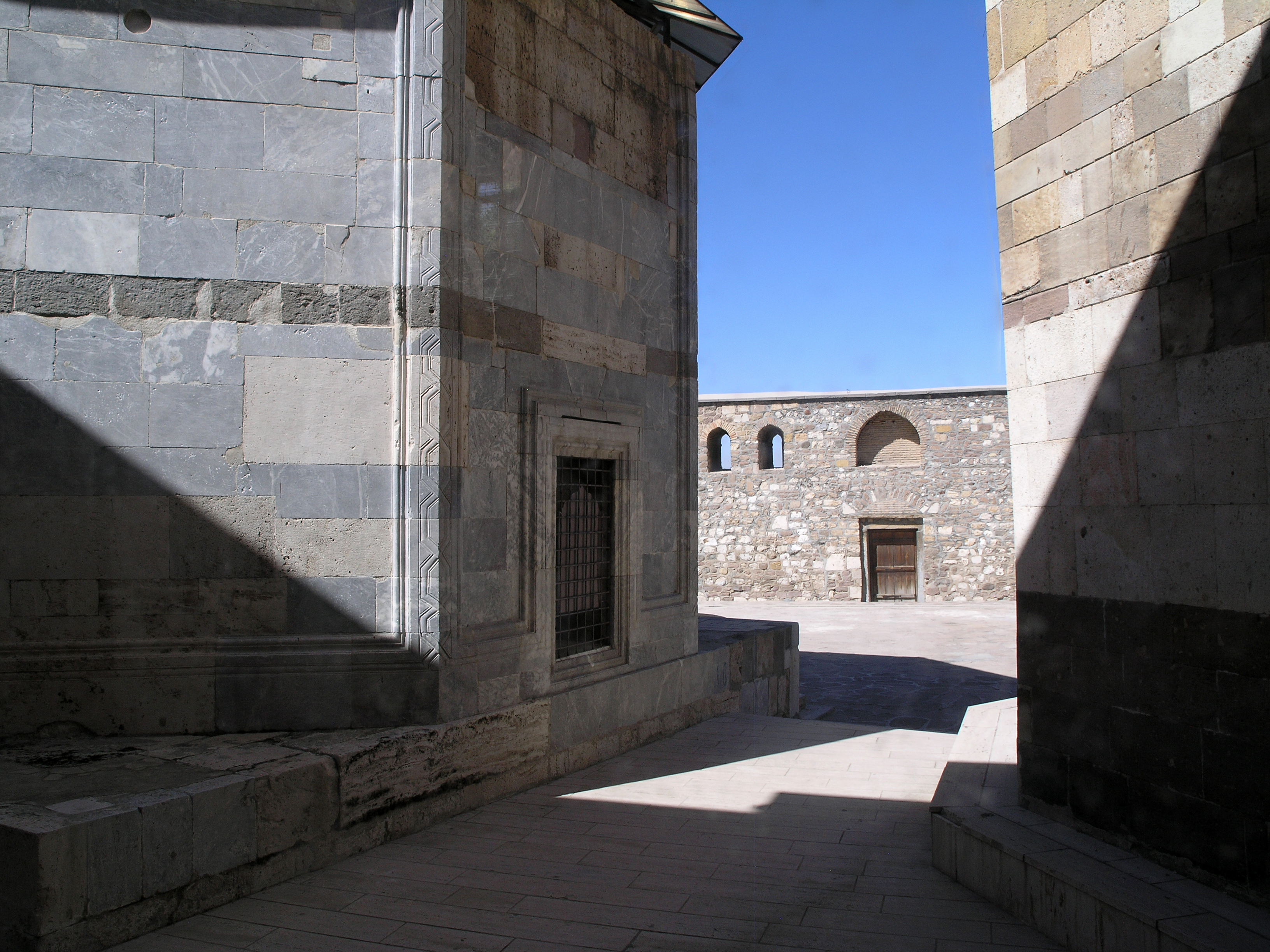 Турция, Конья – Мечеть Ала ад-Дина